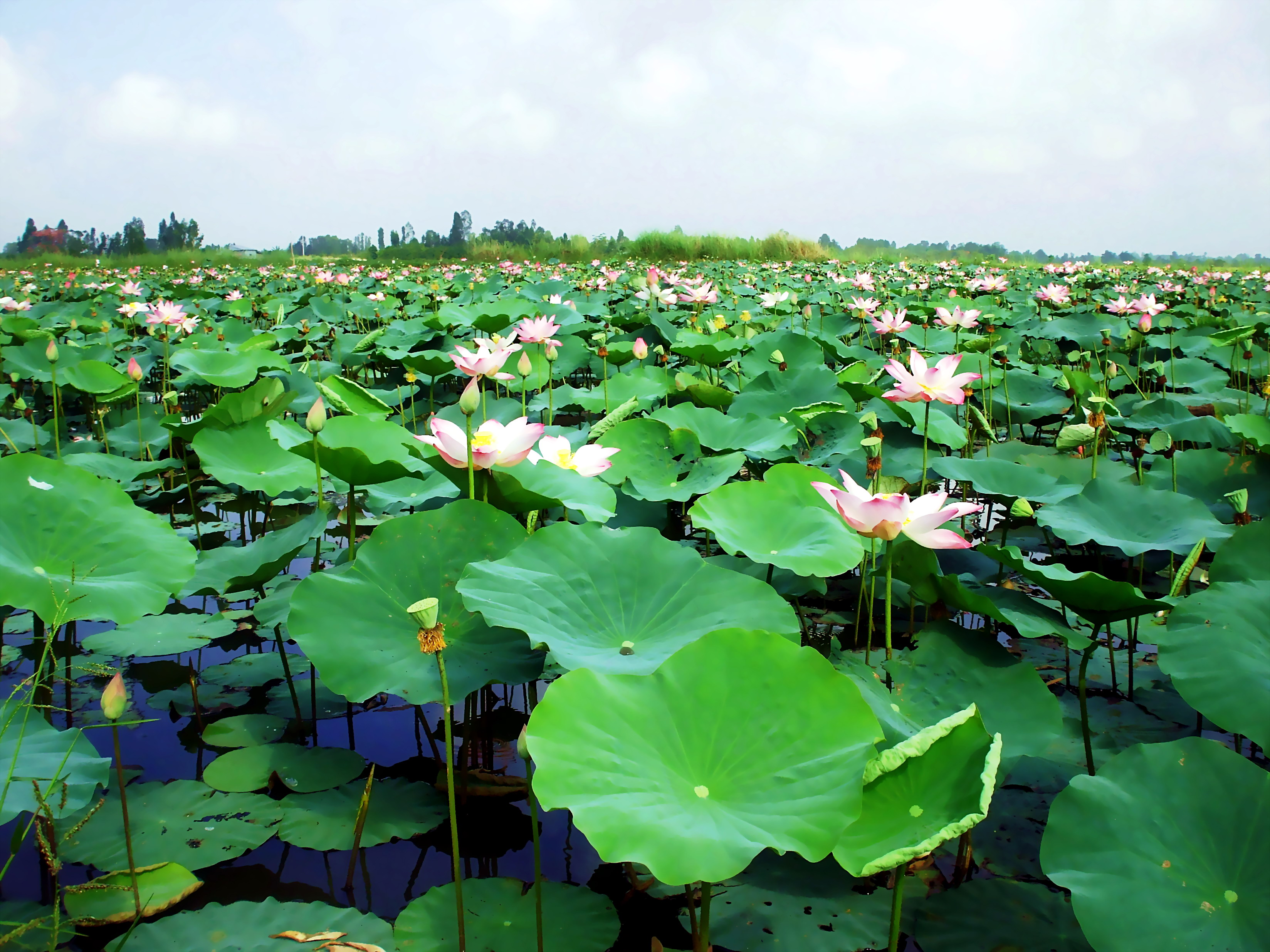 Vepsän kel’: Một đầm sen ở Đồng Tháp, Việt Nam.